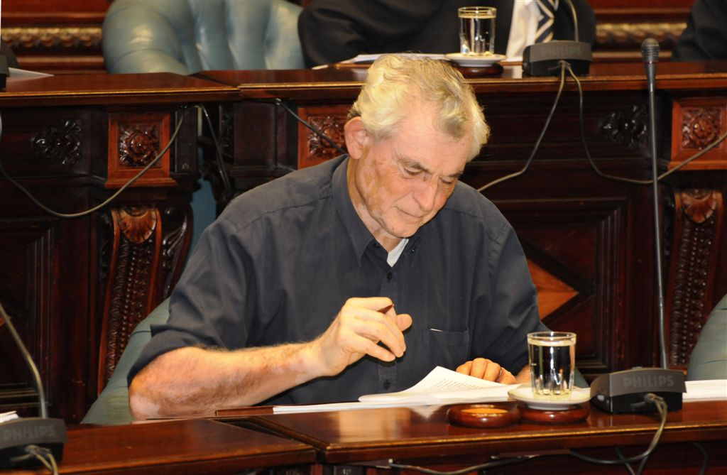 Fotografía del político uruguayo Ernesto Agazzi en una sesión de la Cámara de Senadores